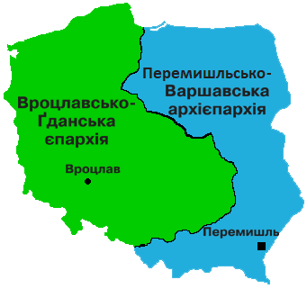 Адміністративний поділ Української греко-католицької церкви у Польщі від 1996 року.